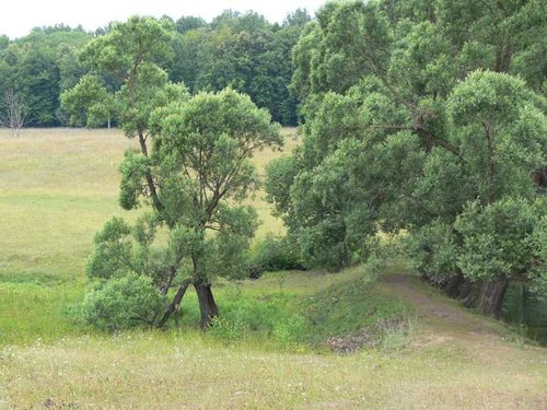 У пруда в Алшихово